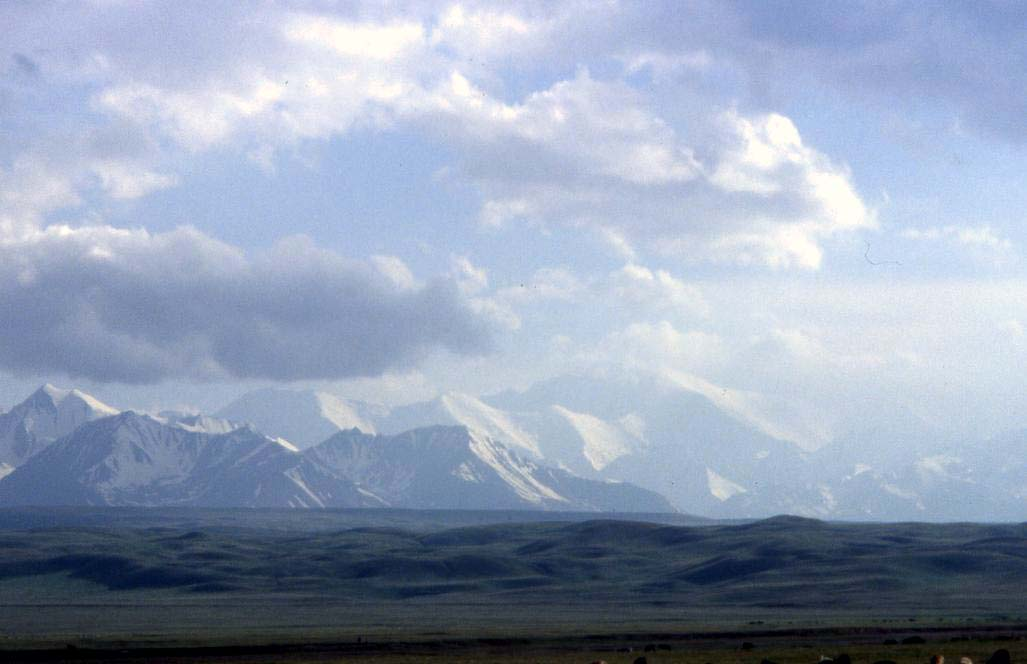 Lenin Peak (Tajikistan) from Irkeshtam (Kyrgyzstan